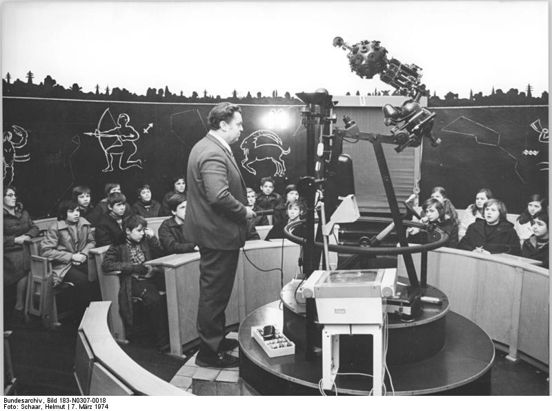 Halle/Saale, Jugendstunde im Planetarium ADN-ZB Schaar 7-3-1974 Halle: Jugendweihestunden im Planetarium-Unter dem Motto "die Welt ist erkennbar" werden jährlich über 5000 Jugendweihe-Teilnehmer im Kleinplanetarium Halle-Kanena in die Geheimnisse der Astronomie eingeweiht. Oberlehrer Karl Kockel, Leiter und Gründer der astronomischen Station, mit Jugendlichen der Goetheschule Halle während einer Stunde im Planetarium.